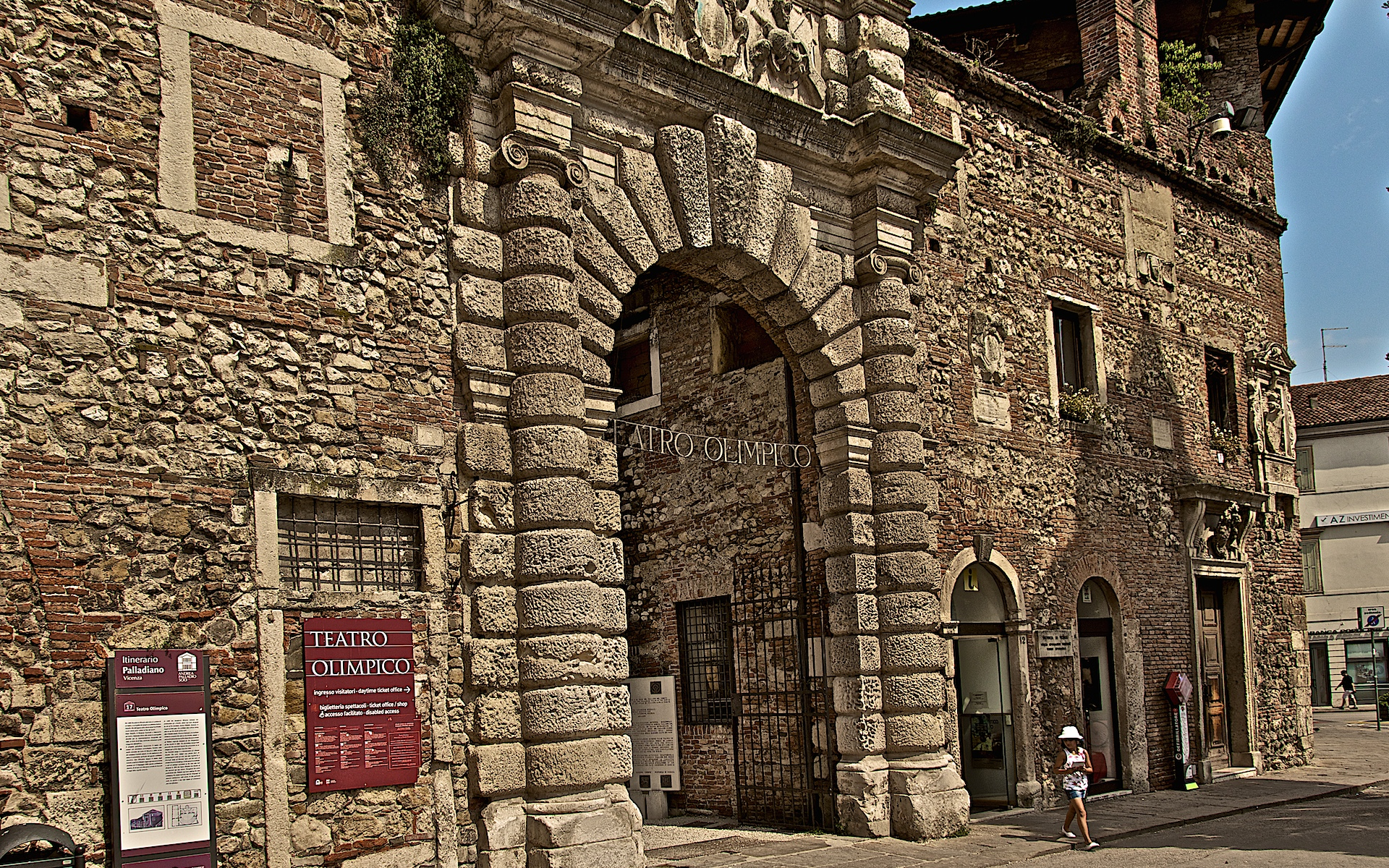 Teatro Olimpico This is a photo of a monument which is part of cultural heritage of Italy.